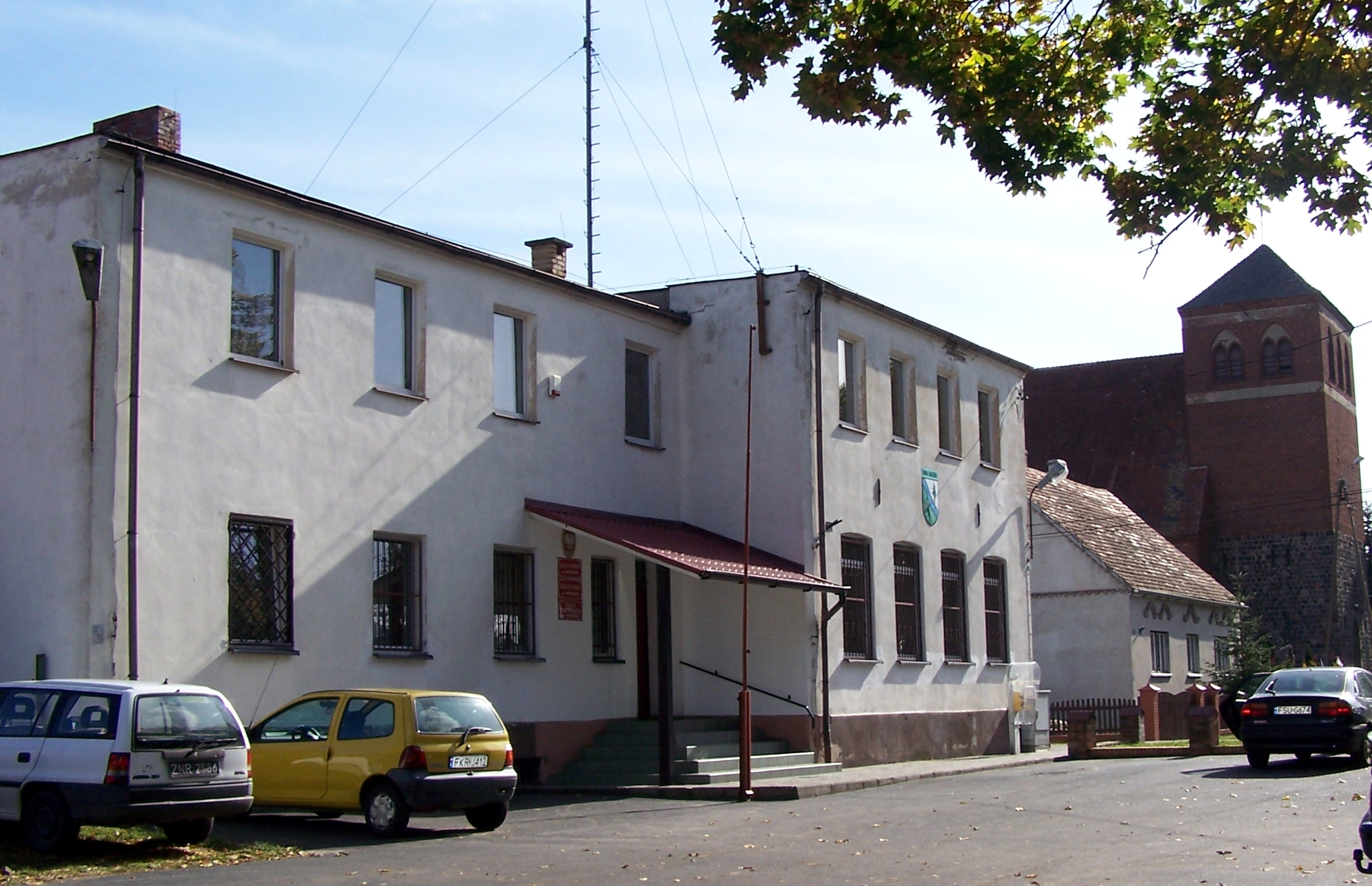 Maszewo. Urząd Gminy i kościół.